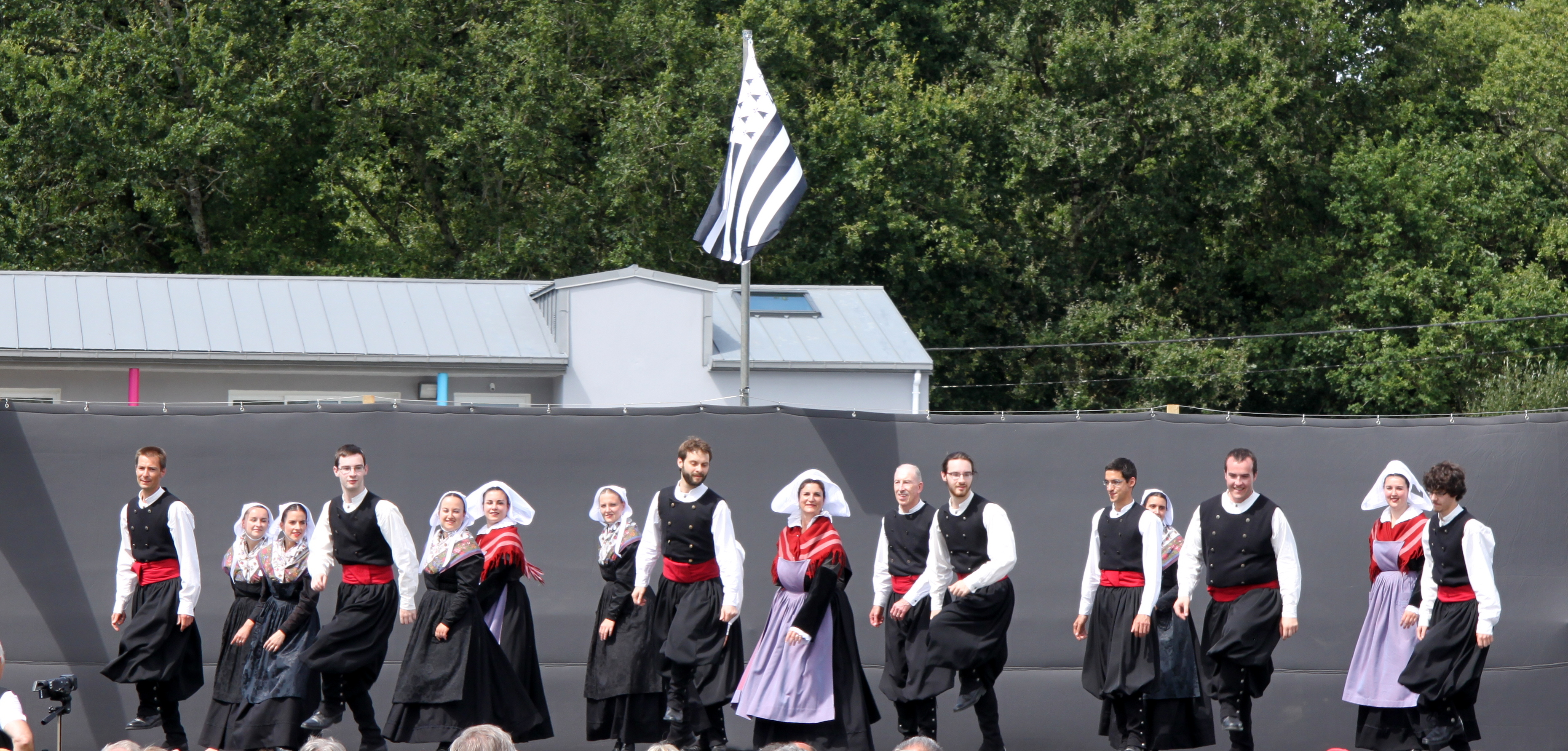 Noce Bretonne à Pluneret : passage du Cercle celtique de Guingamp (Kroaz Hent Gwengamp).